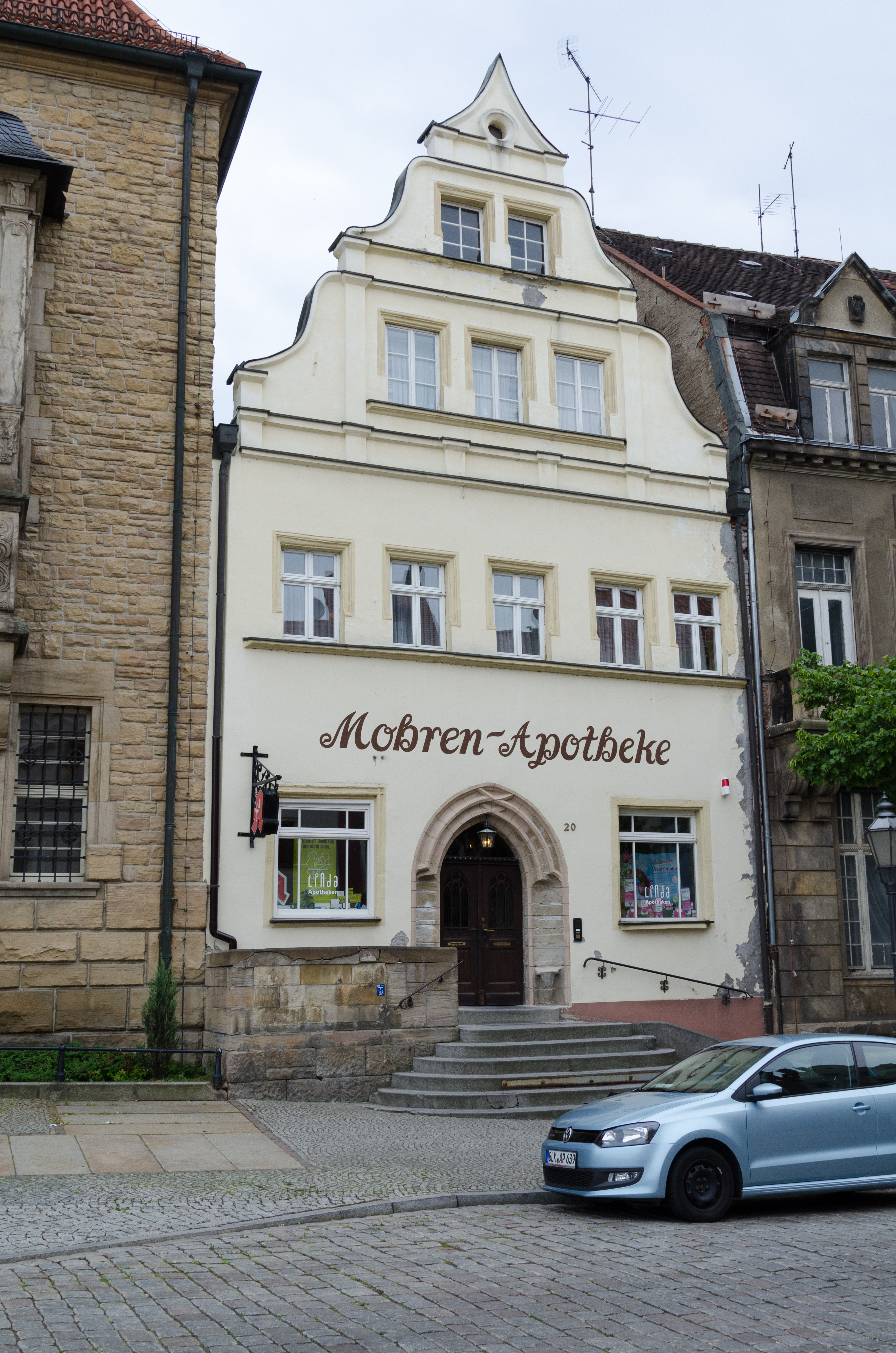 Zeitz, Brüderstraße 20